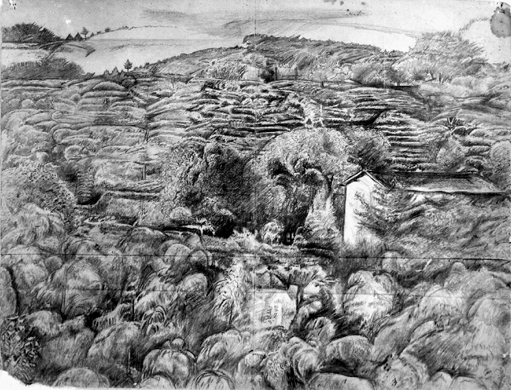 「六地蔵附近」